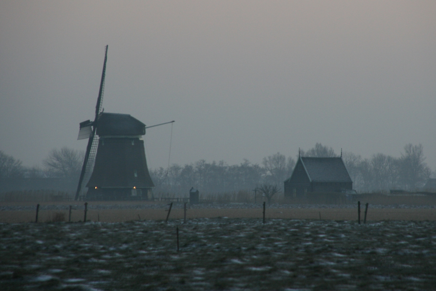 't Zand: molen Zijpe O-T, op een winternamiddag